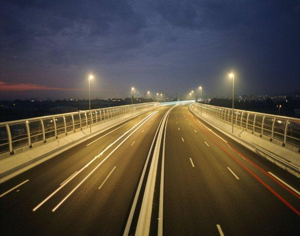 A14 de nuit